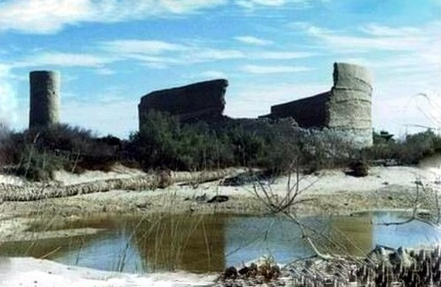 البناء الأثري احتضن الحجر الأسود الكائن شرق السعودية في محافظة القطيف تحديداً في شمال شرق بلدة الجش